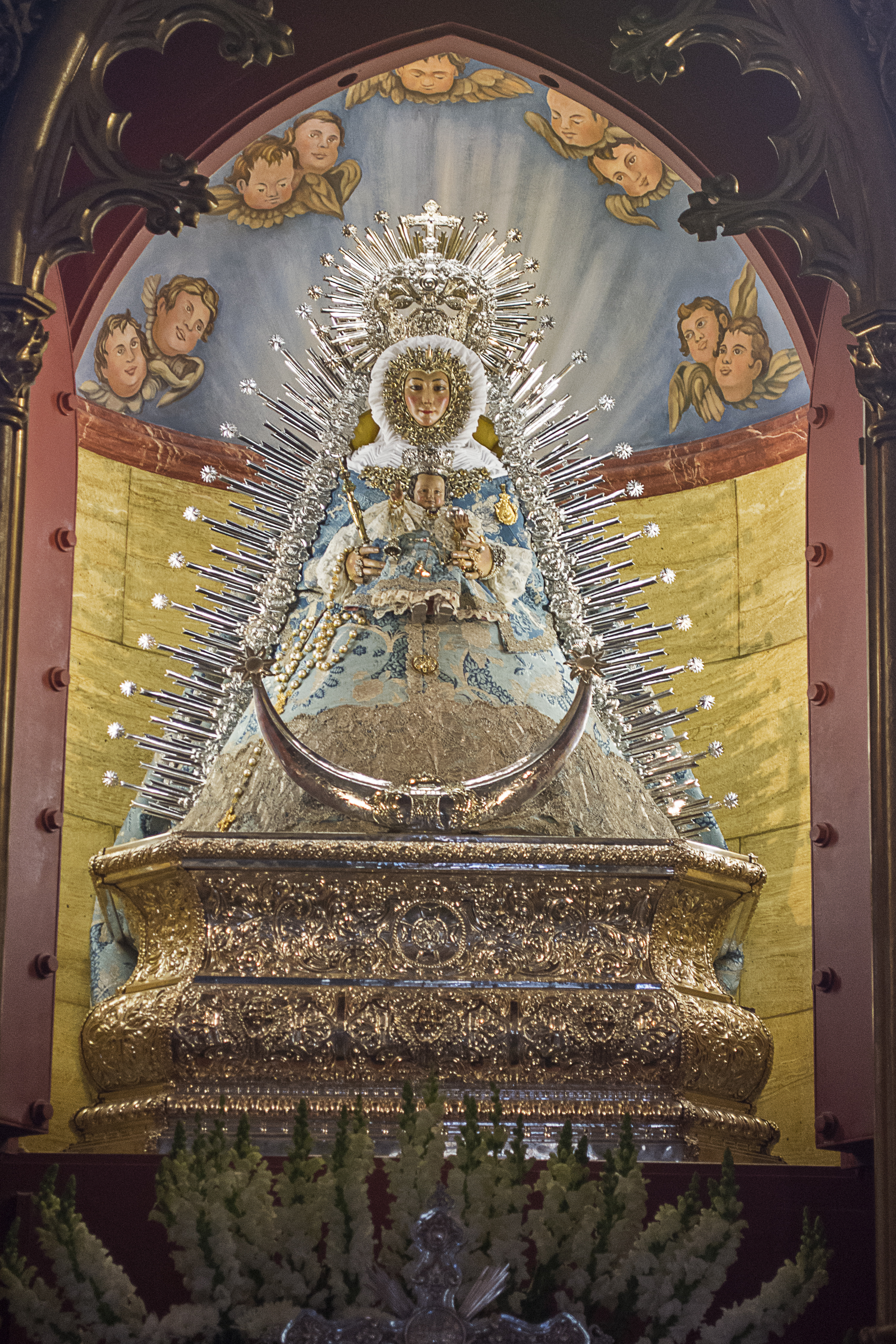 Virgen de Setefilla durante su estancia en la iglesia de Nuestra Señora de la Asunción en Lora del Río.